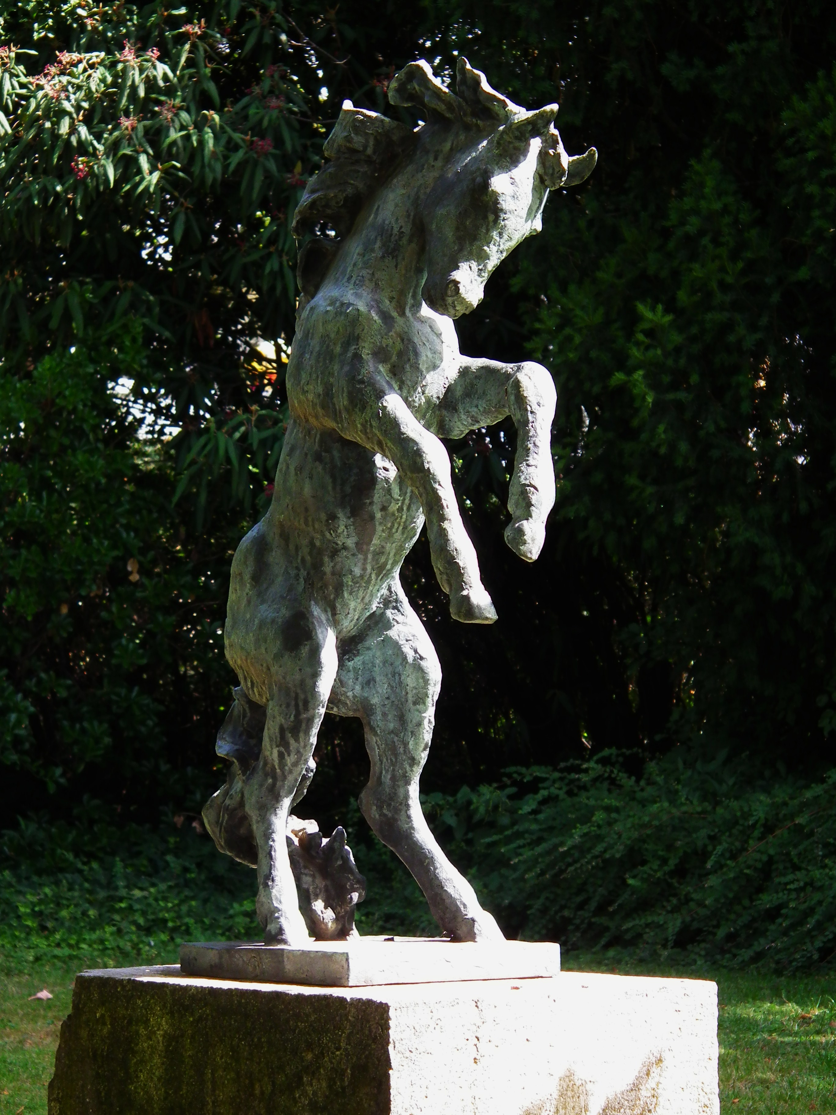 Lameygarten in Mannheim (Baden-Württemberg, Deutschland)